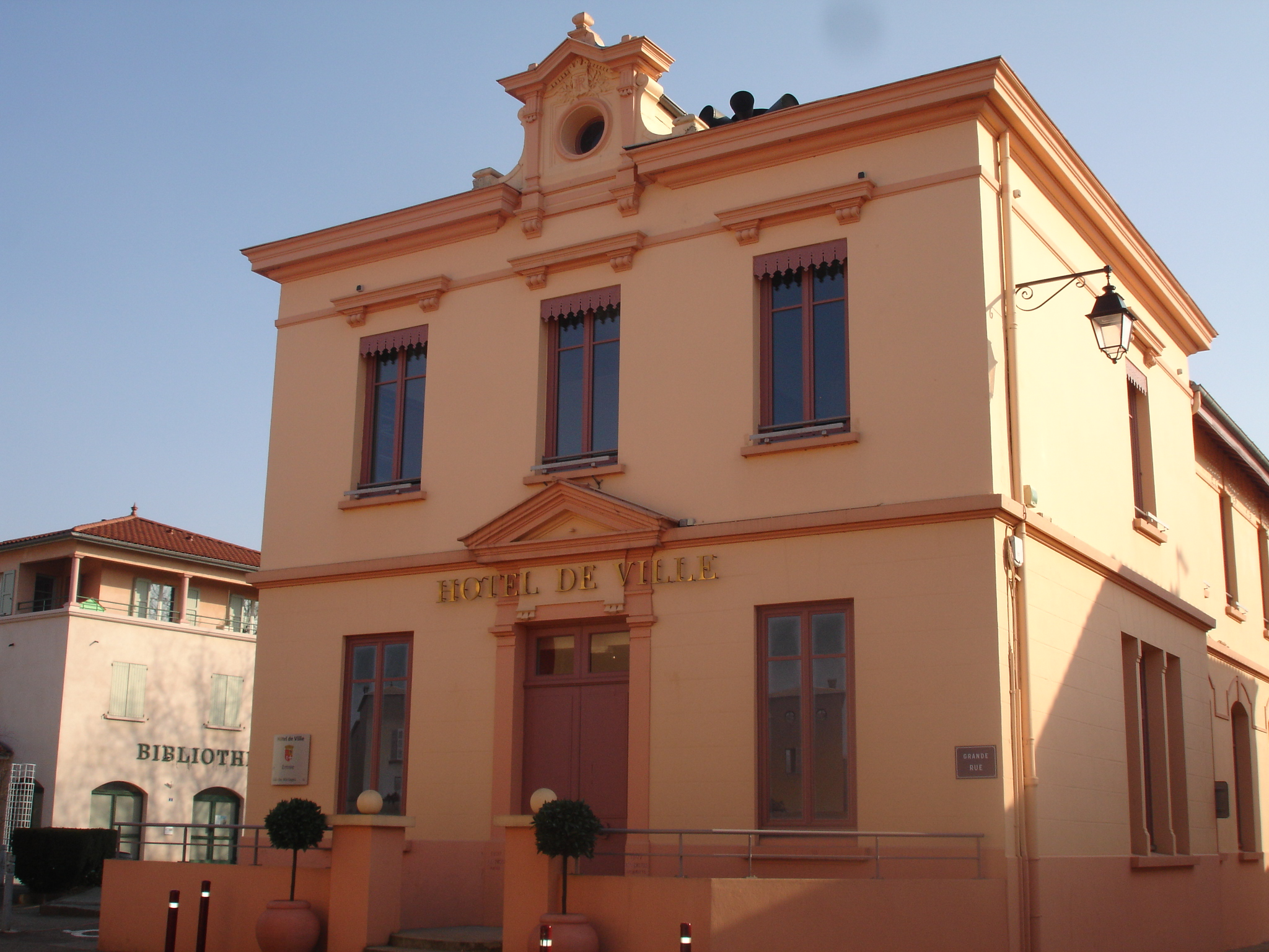 Ternay (69) : la mairie vue générale